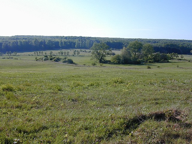 Kerstlingeroederfeld bei Göttingen (FFH-Schutzgebiet).